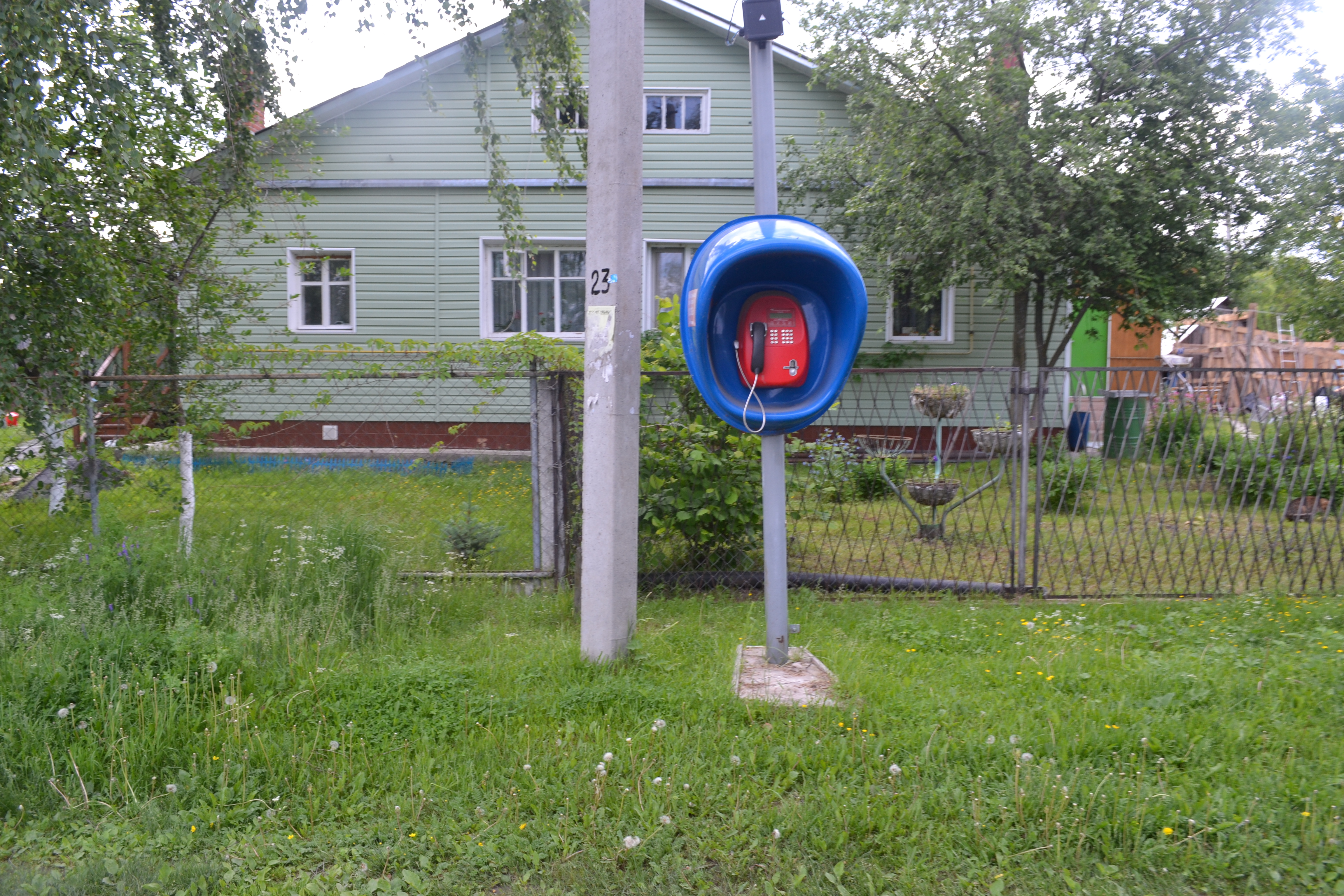 Телефон в деревне Филимакино (Шатурский район)